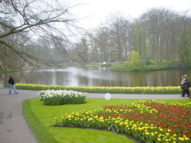 Kuekenhof